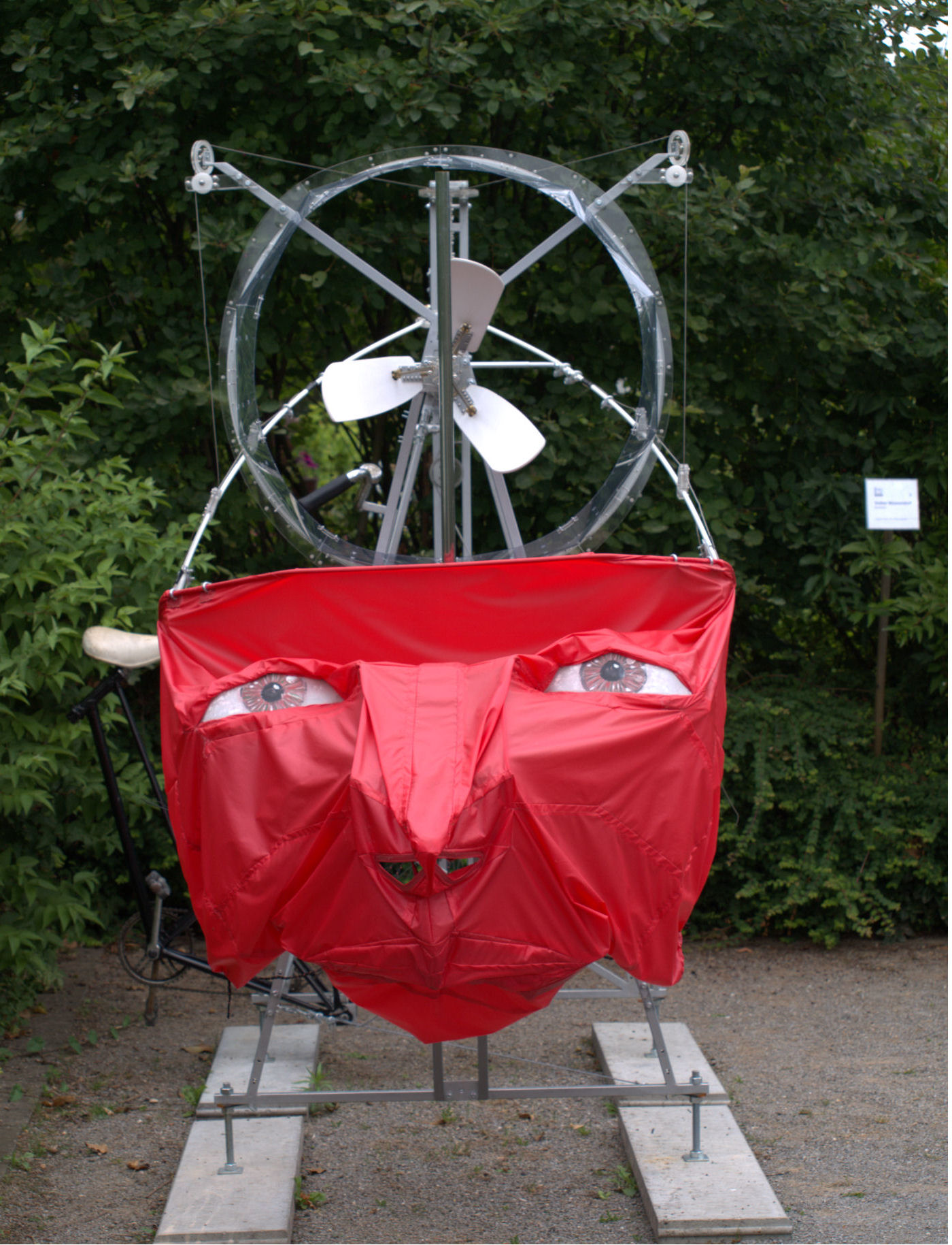 durch Pedalkraft angetriebene Installation, Skulpturenpreis „Kunst trifft Kohl 2009“